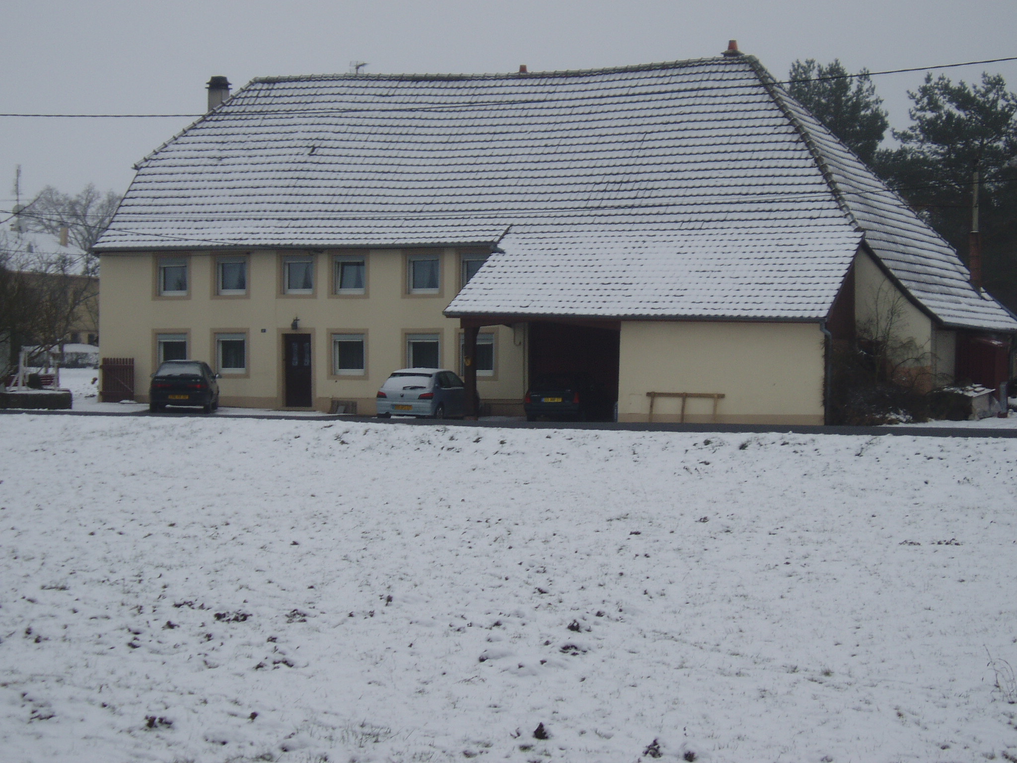 Maison à Schopp, Phalsbourg, Moselle